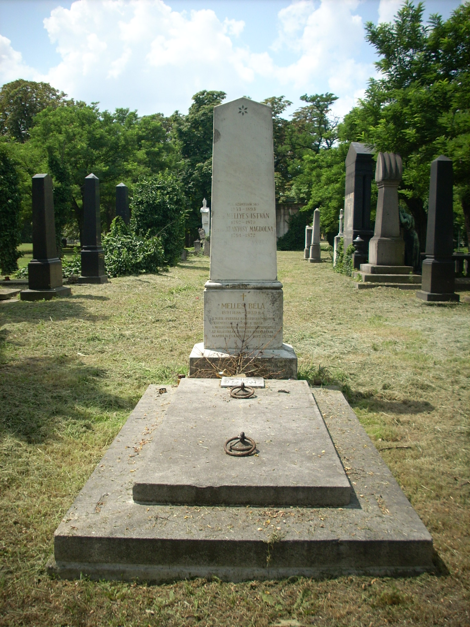 Melles Béla (1891-1939) hegedűművész sírja a Fiumei Úti Sírkertben [9/2-1-29/30]